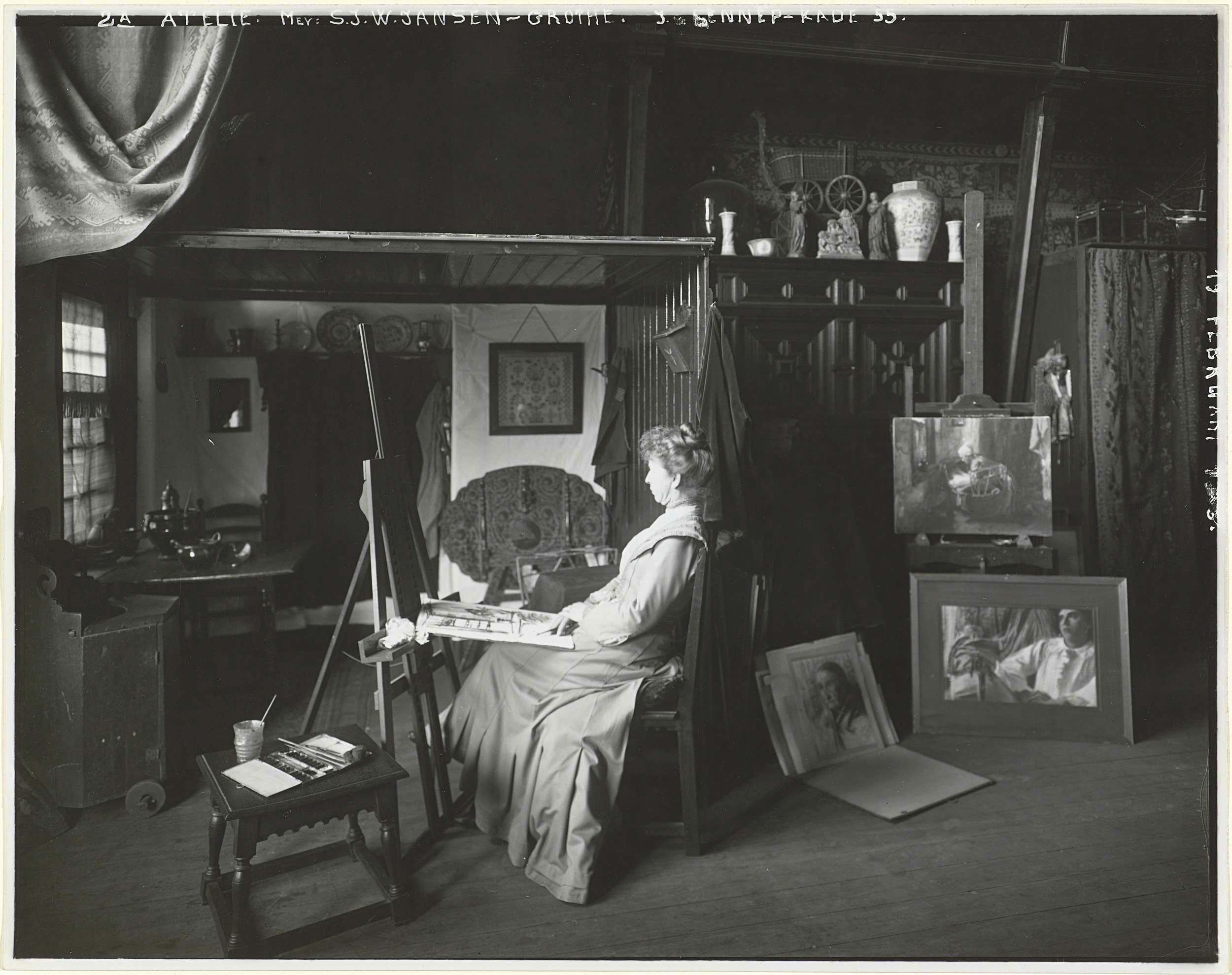 De schilderes S.J.W. Jansen-Grothe in haar atelier, gefotografeerd door Sigmund Löw in 1903.